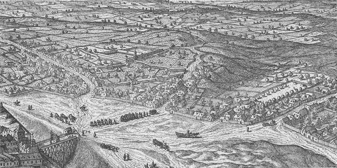 Vor dem Schottentor 1609. Links die Alservorstadt mit dem kaiserlichen Gottesacker (Friedhof, heute Hof 8+9 des alten AKH). In der Mitte die Währinger Straße mit dem Abhang des Schottenpoints zur Roßau mit dem bürgerlichen Schießplatz.